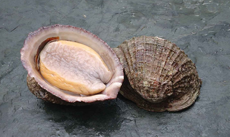 Loco de Puerto Montt, Chile.